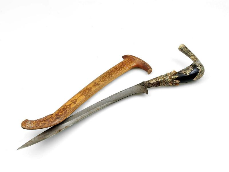 Kris (onderdeel). IJzeren lemmet met houten met schede Unknown language: Reuntjöng